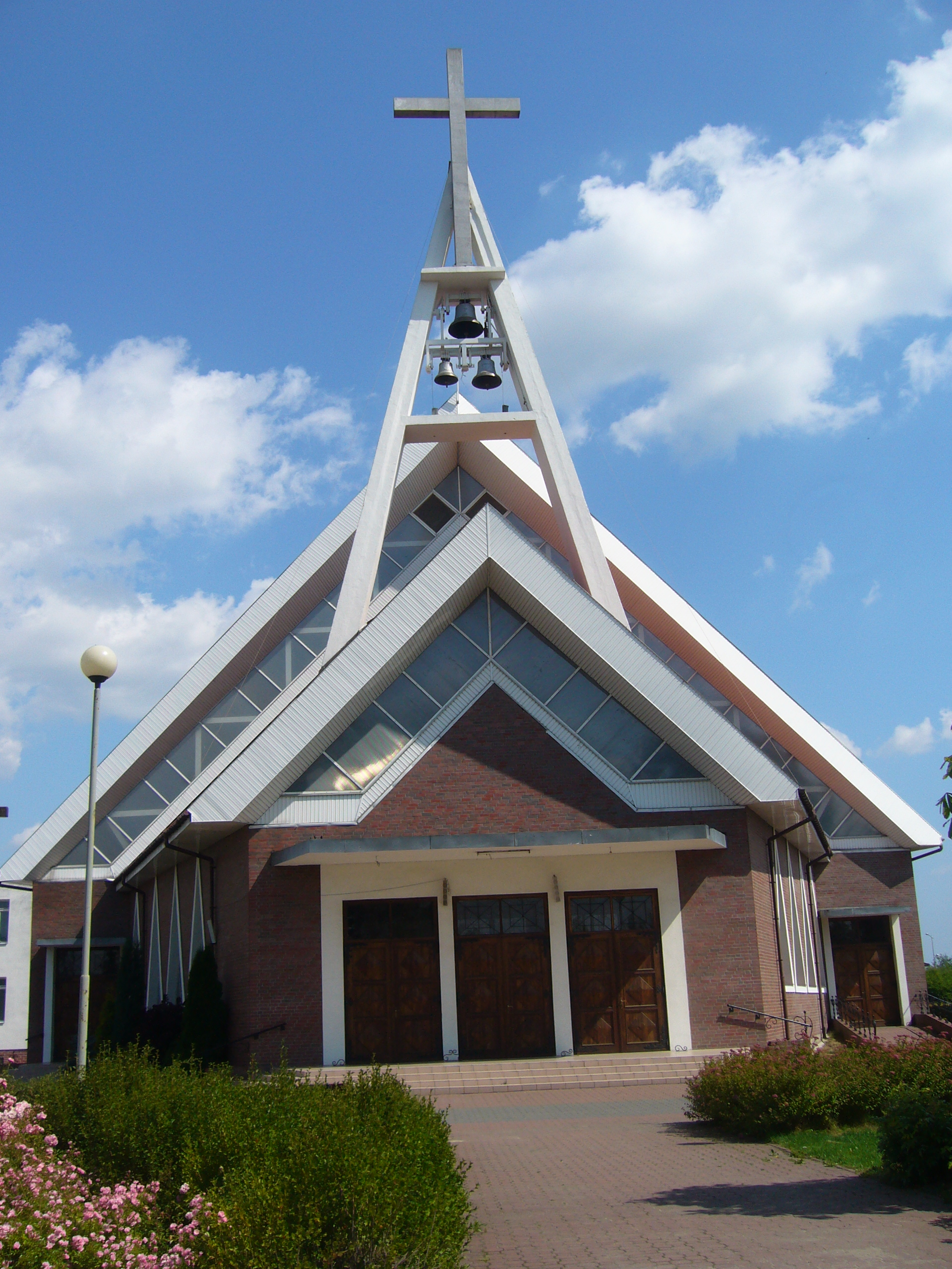 Pruszcz Gdański - kościół rzymskokatolicki pw. bł. Michała Kozala.